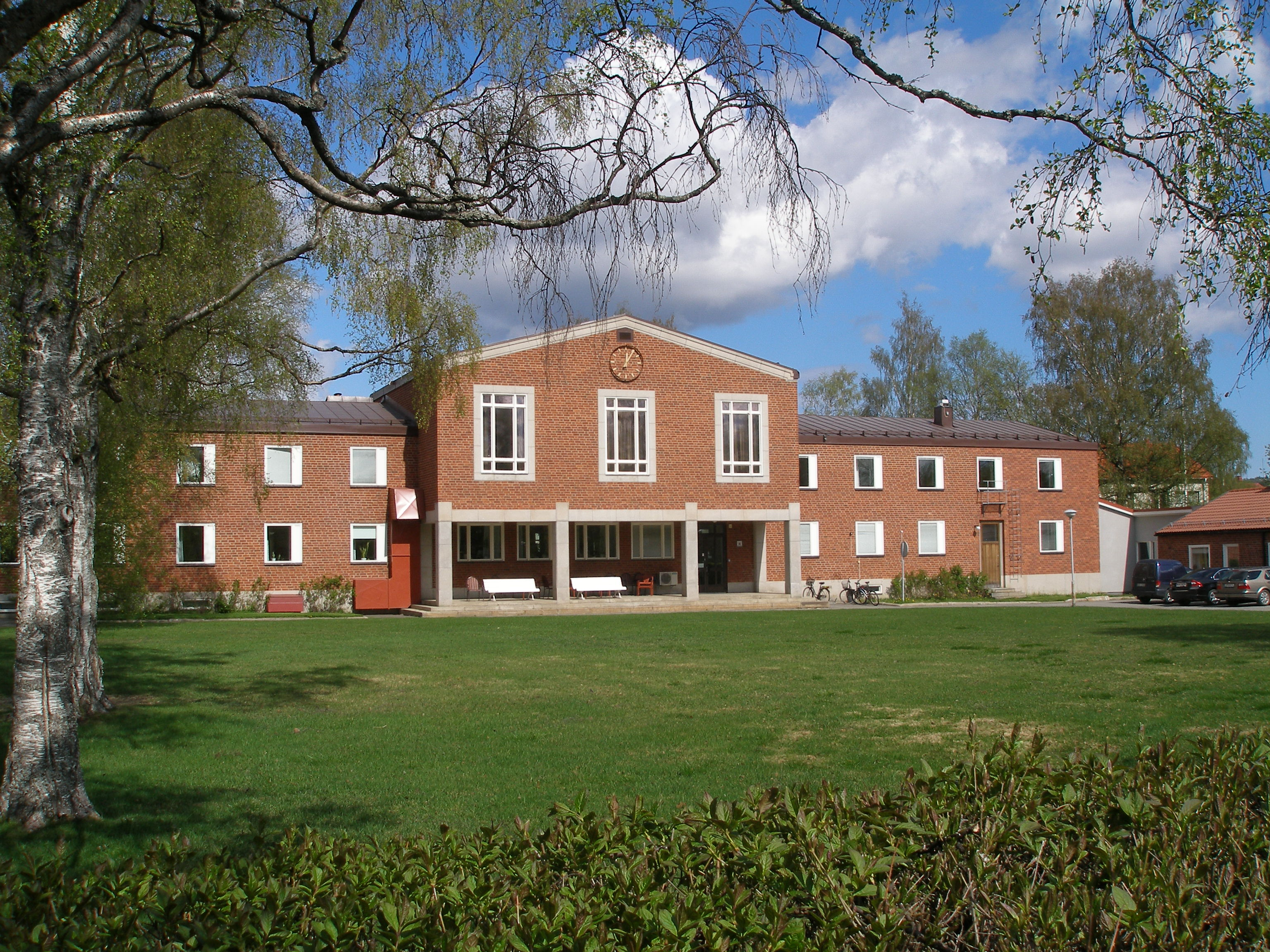 Tingsrätten i Skellefteå, Västerbotten. Södra fasaden.